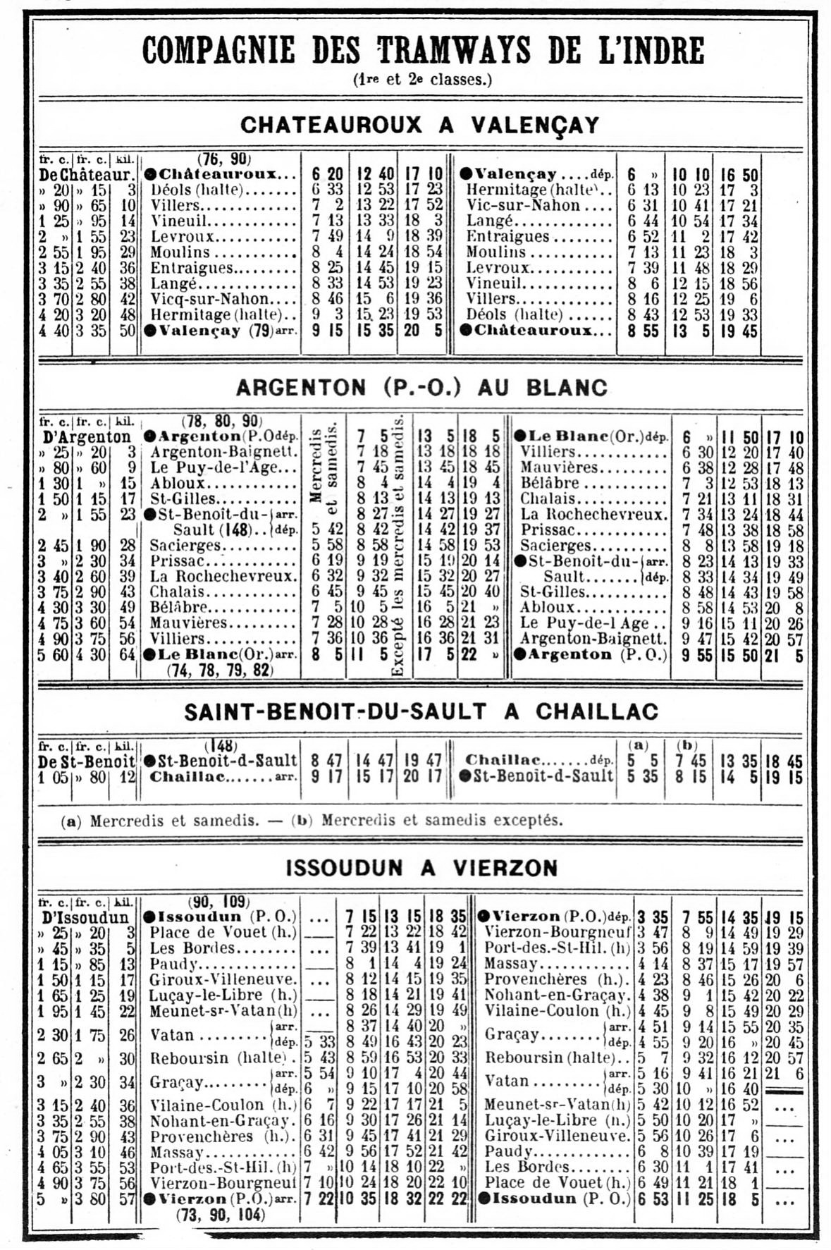 Horaires des Tramways de l'Indre de mai 1914